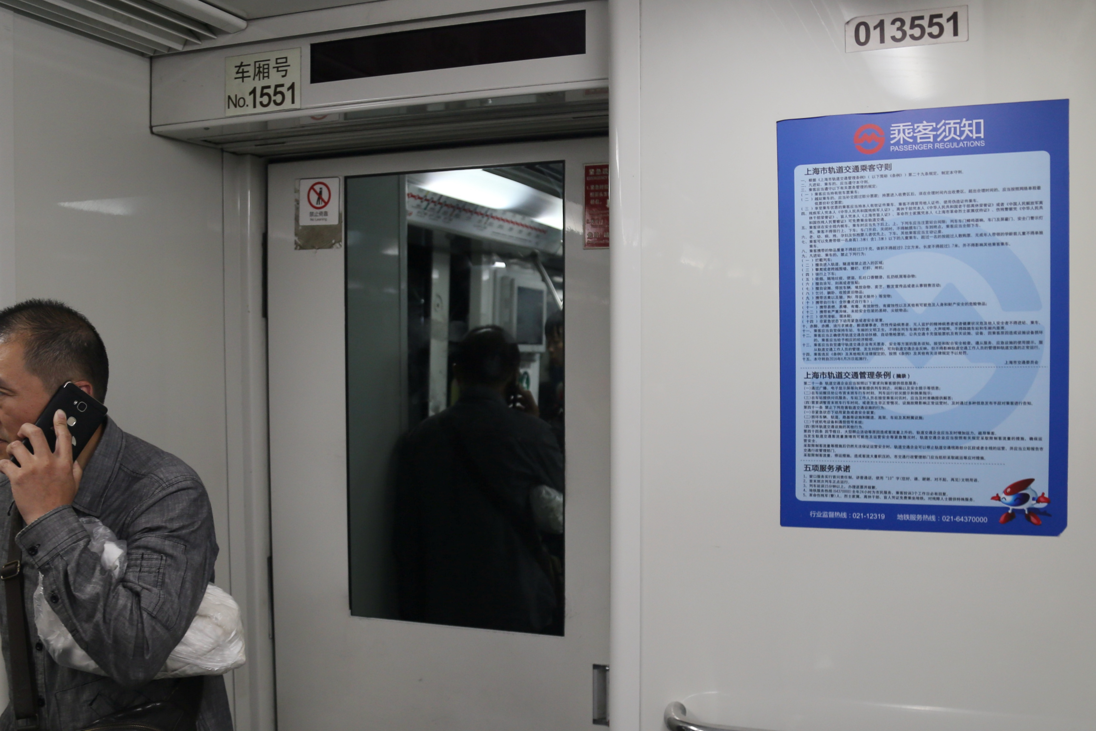 01A05列车驾驶室后的玻璃窗